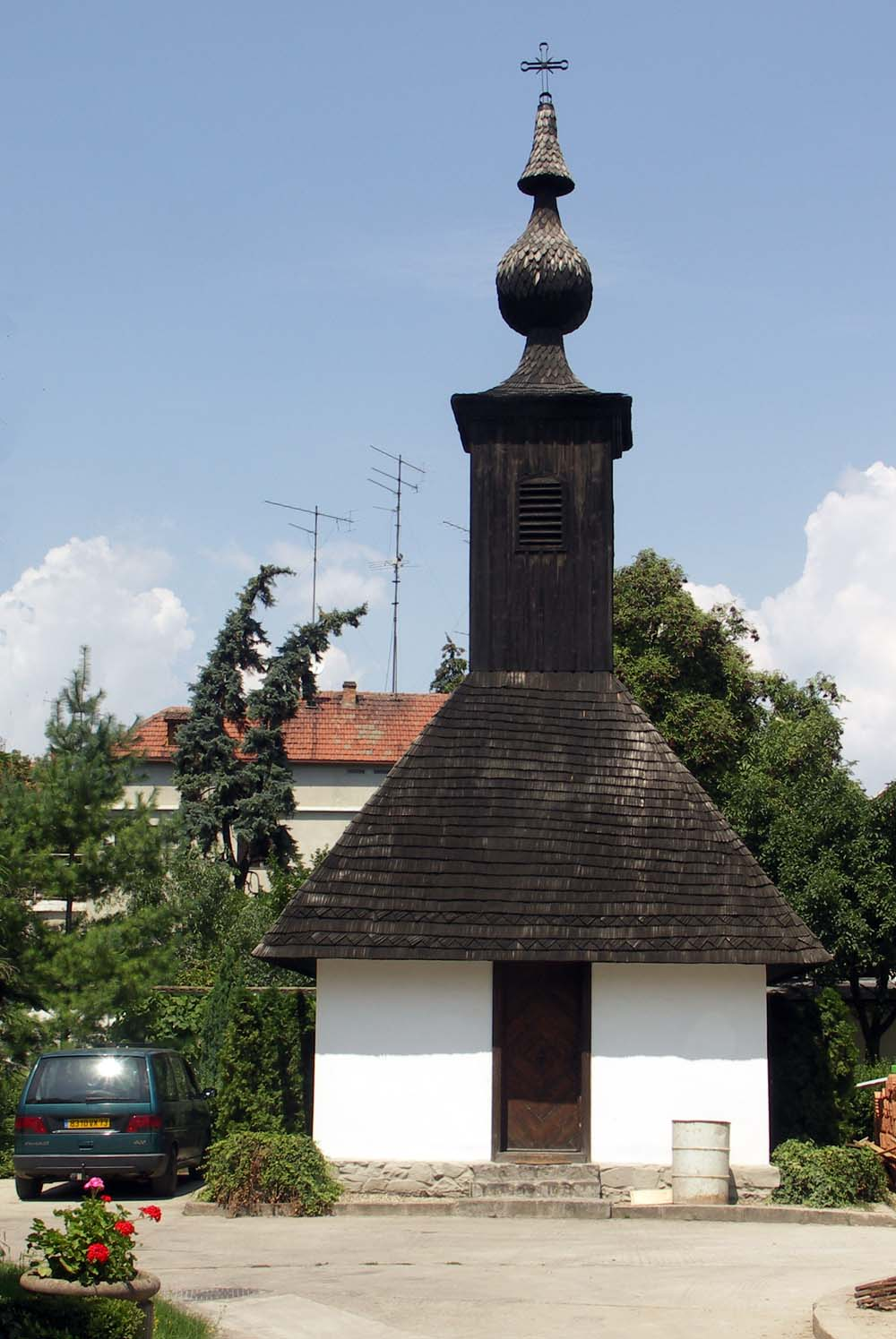 Biserica de lemn din Hodoş, adusă în curtea Mitropoliei Banatului din Timişoara.